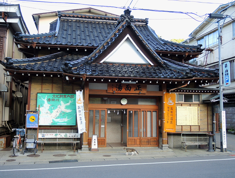 共同浴場「正面湯」